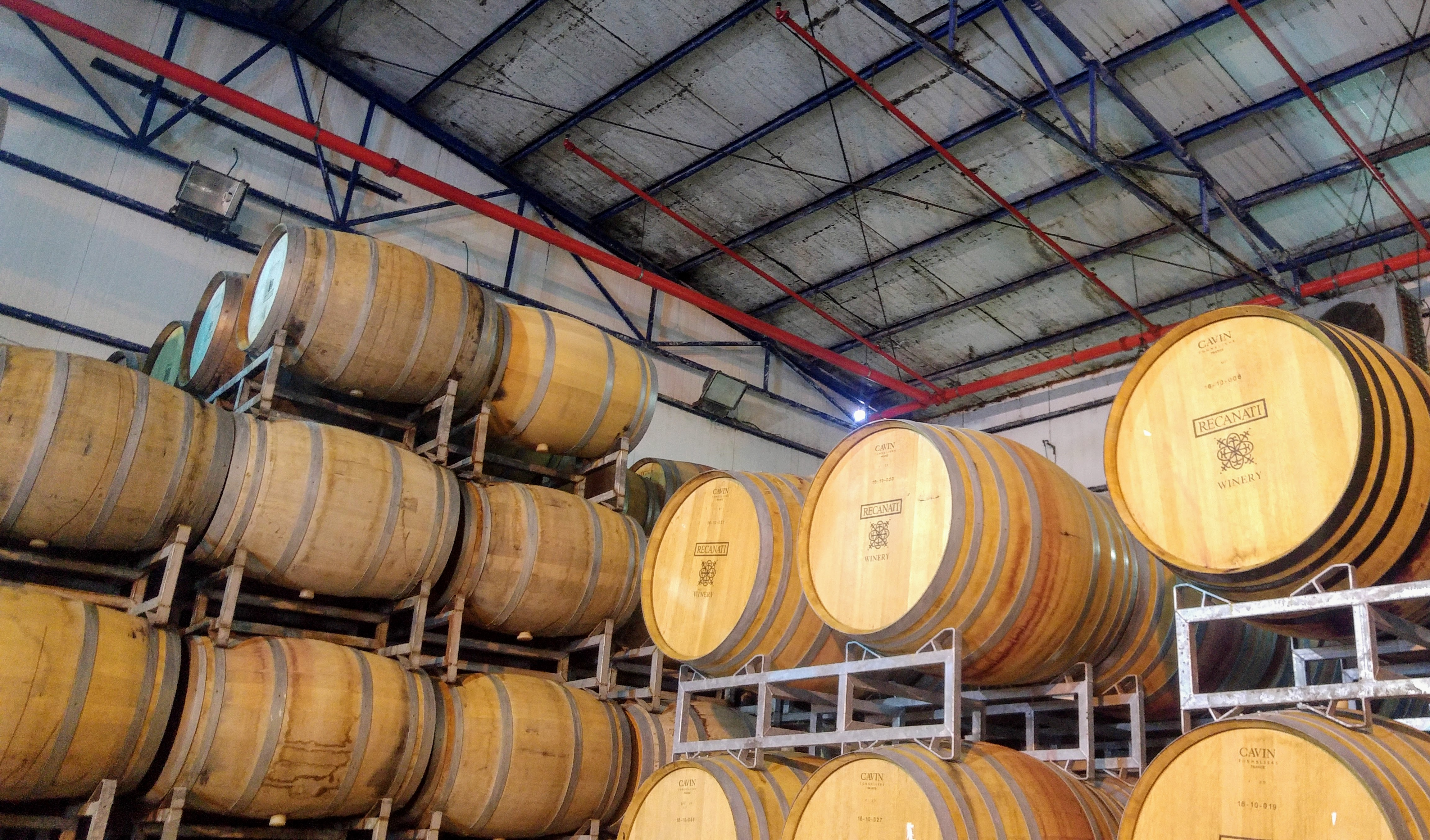 חדר חביות ביקב רקנאטי עמק חפר מאי 2017